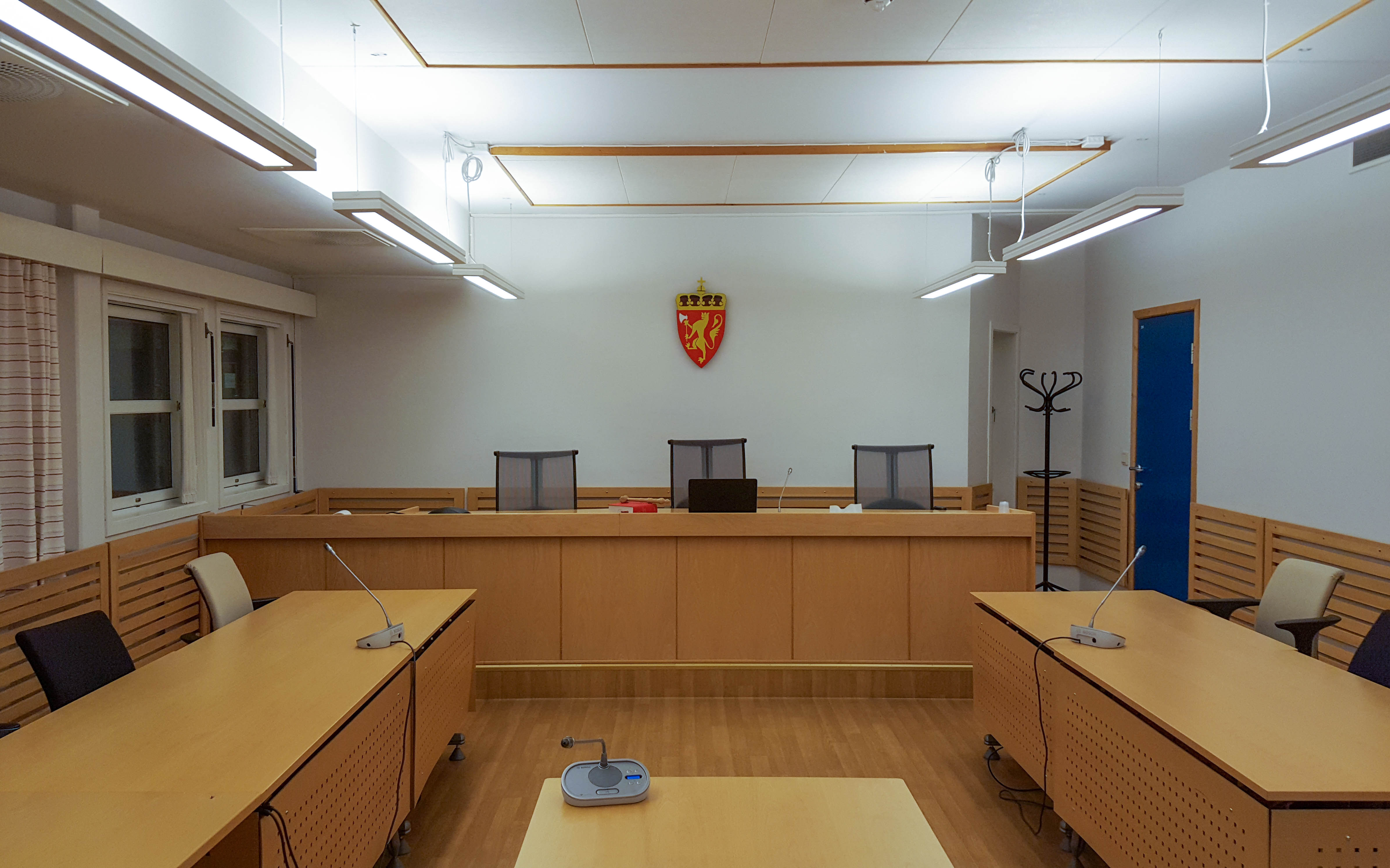 Alta tingrett fra innsiden.